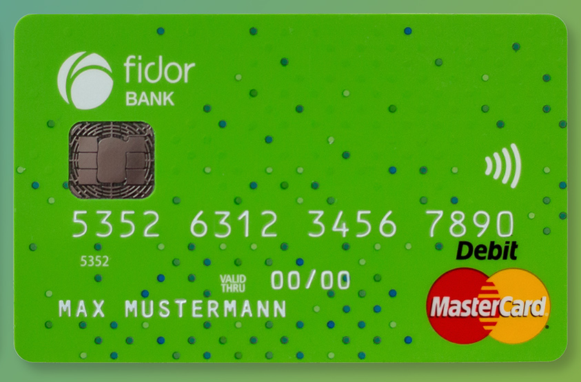 Foto der ersten Debit-MasterCard einer deutschen Bank. Foto von Musterkarte